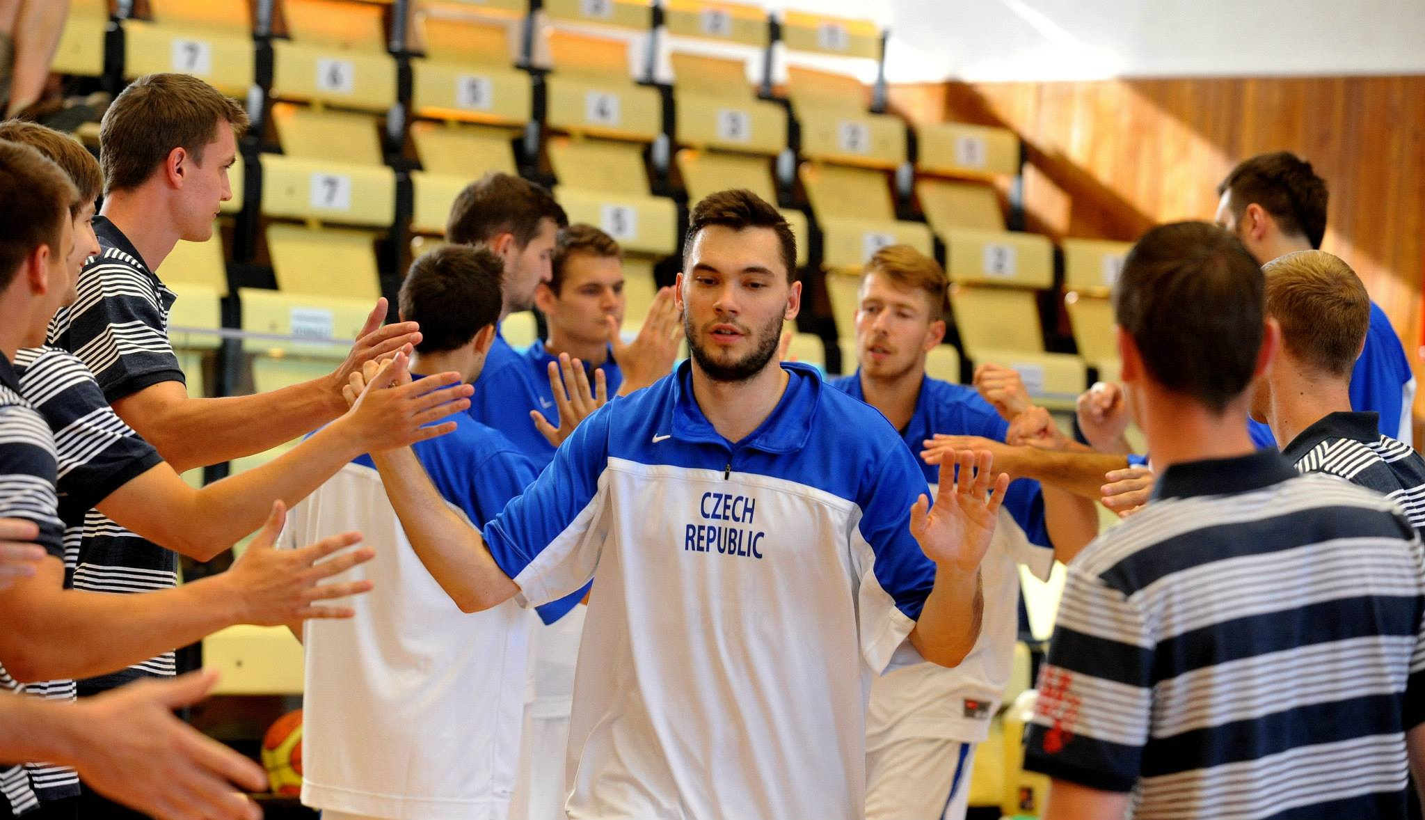 Adam Ciz "Olovo"